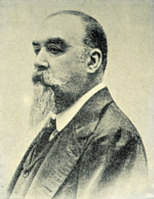 Retrato de Marcelino de Unceta. (Fotografía)